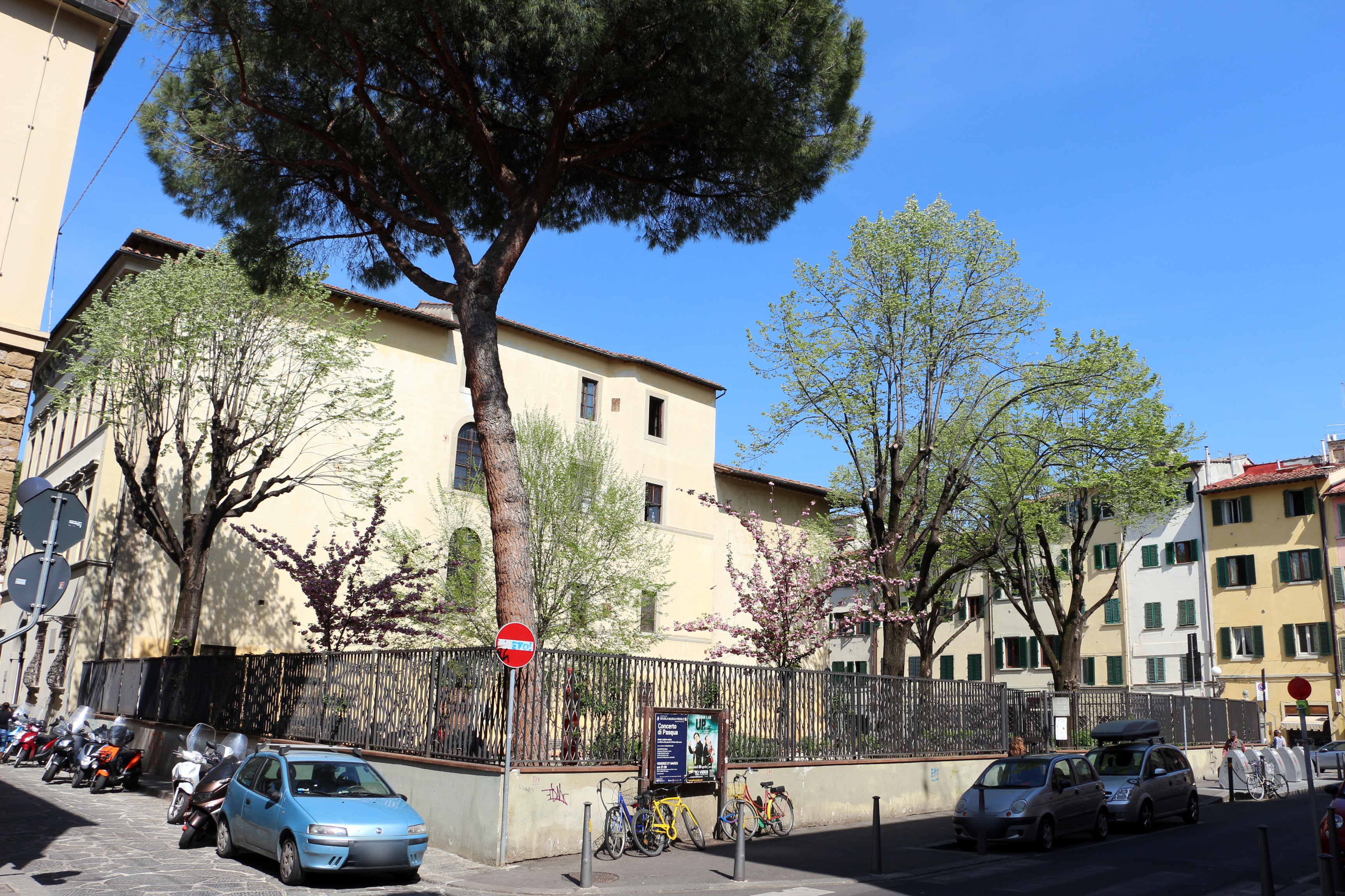 Bernardino poccetti, nozze di cana, 1604, 01.JPG